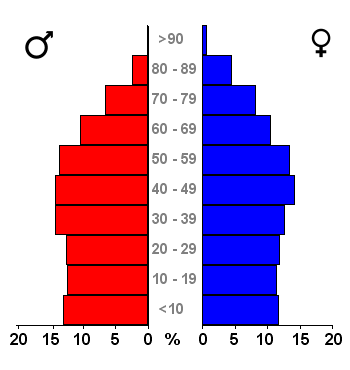 Age pyramids for the 443 municipalities in the Netherlands. Data 2007. Statistics provided by Centraal Bureau voor de Statistiek, Voorburg/Heerlen. Source: Tabel: Bevolking Nederland per gemeente en diverse regio's naar leeftijd, geslacht en burgerlijke staat, 1 januari 1988-2007. Gewijzigd op 24 mei 2007 (on-line database StatLine) Bevolkingspiramide - Gemeente Hoogeveen (2007).png